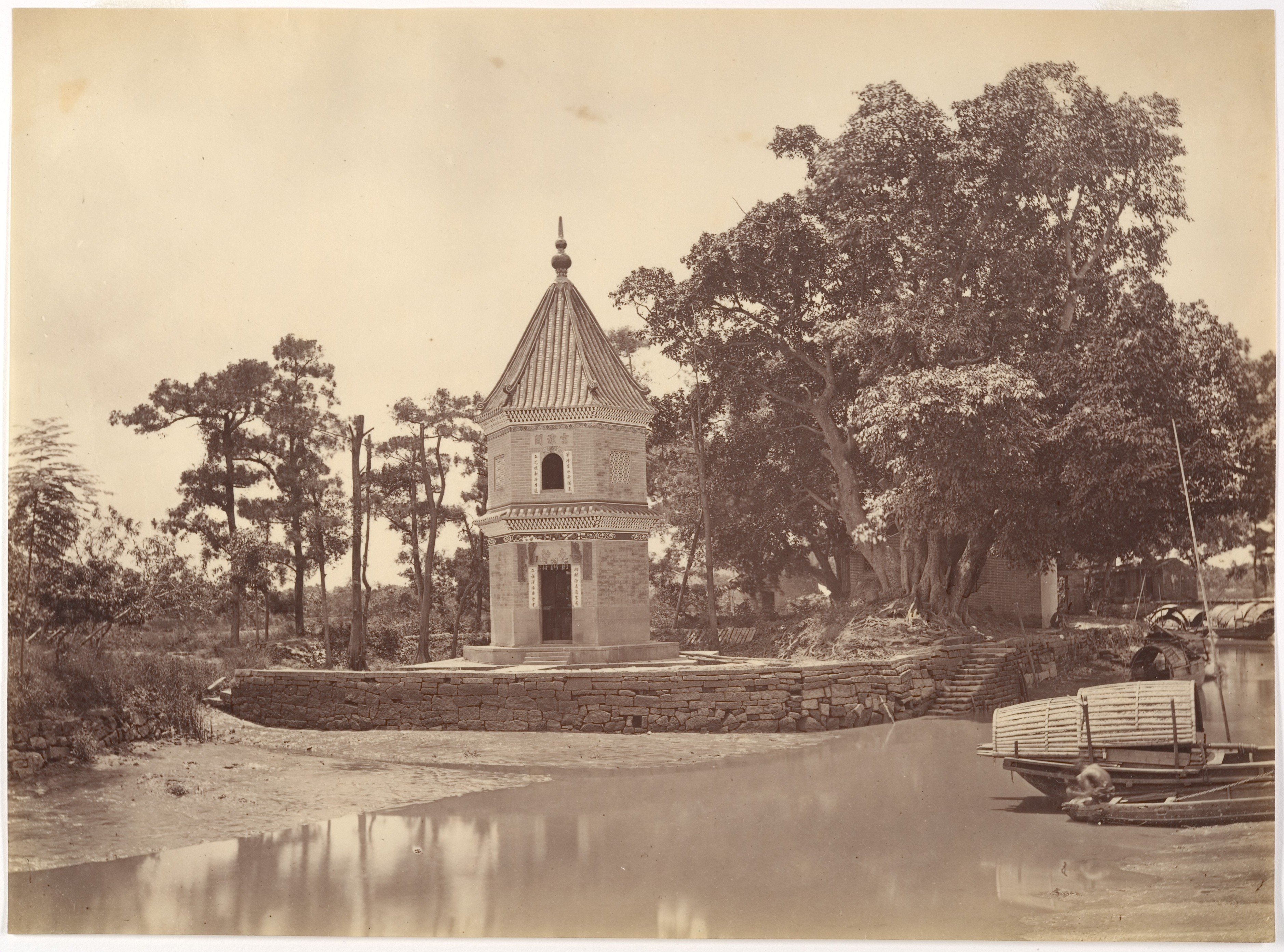 位於廣州市西關地區西關涌邊的文塔。